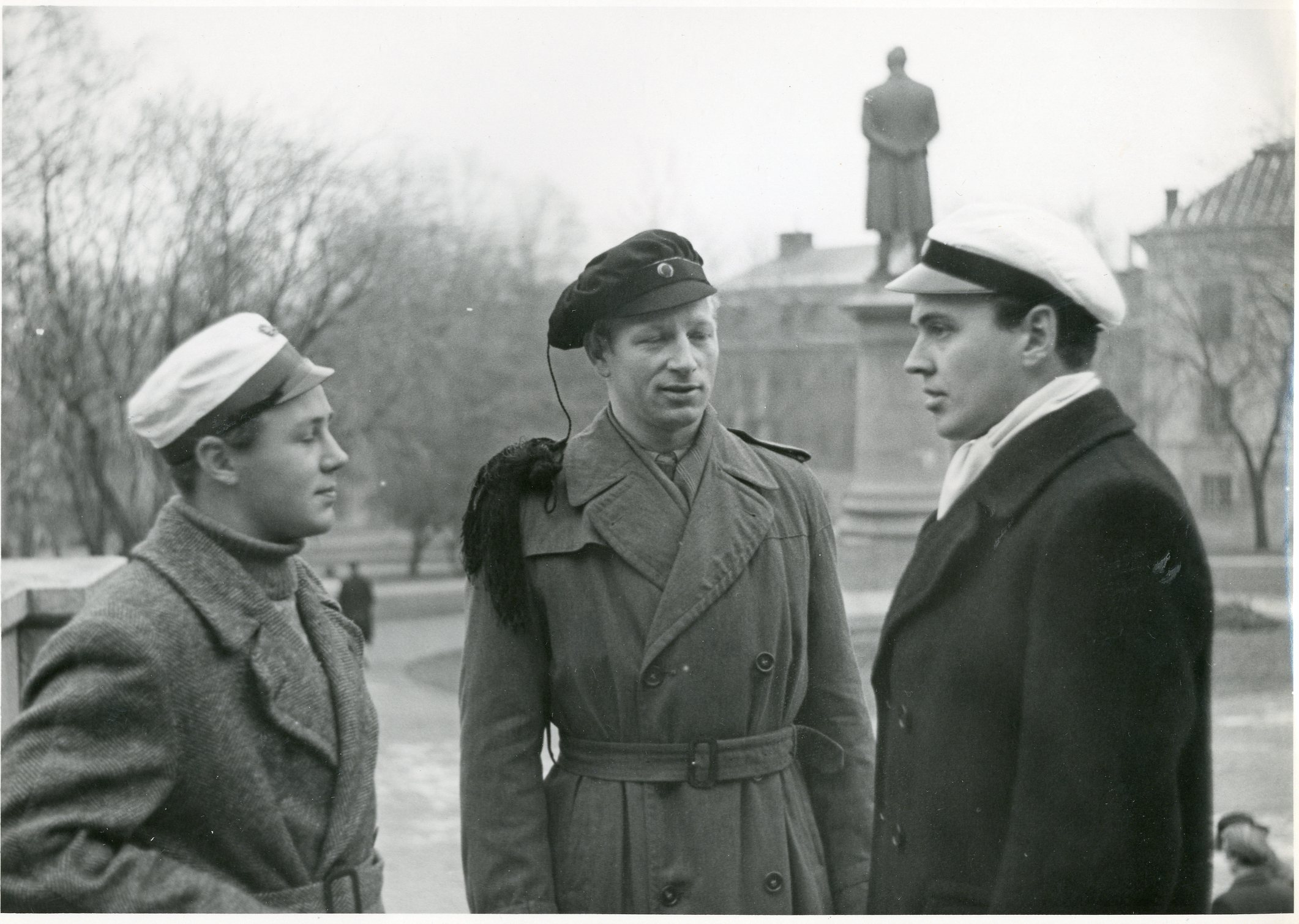 Fra studentdemonstrasjonen i Uppsala den 4. desember 1943 i anledning arresteringen av Oslo-studentene RA/PA-1209/Uc/67/2/S 1017